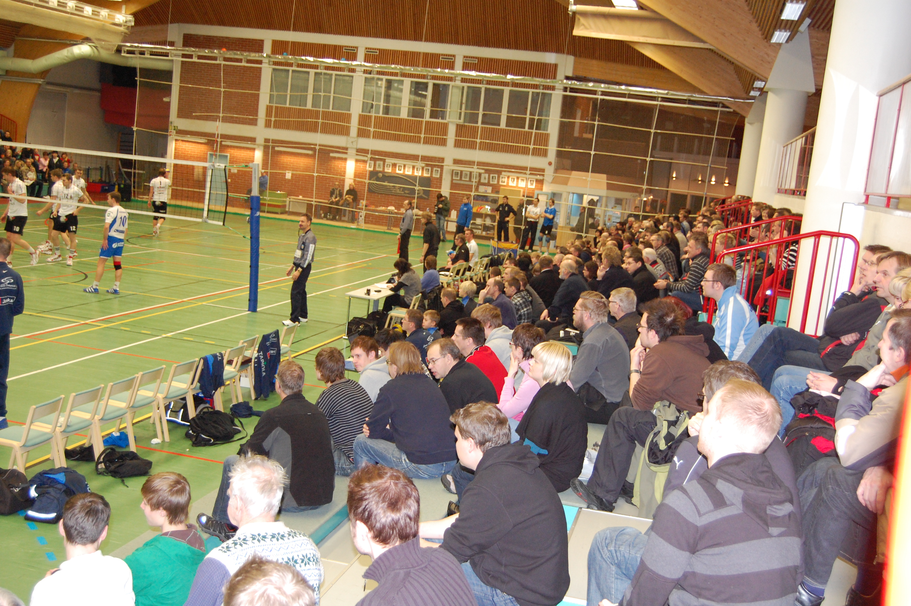 Lentopallon ykkössarja kamppailu Nurmon liikuntahallilla Nurmon Jymyn sekä Vaasan Kiiston välillä.